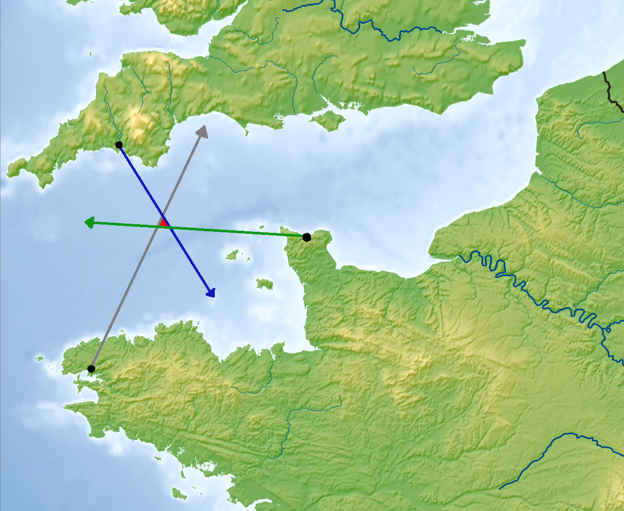 Triangulation par radiogoniométrie en radiotélégraphie sur la fréquence normale mondiale de 410 kHz. Certaines stations radiogoniométrique restes ouvertes pour la détresse et l'urgence sur les fréquences: 2182 kHz, 4125 kHz, 121,5 MHz, 156,8 MHz et éventuellement dans plusieurs pays sur 500 kHz. Le navire ou l'aéronef est le plus souvent dans triangle rouge de l'intersection des 3 relevés.